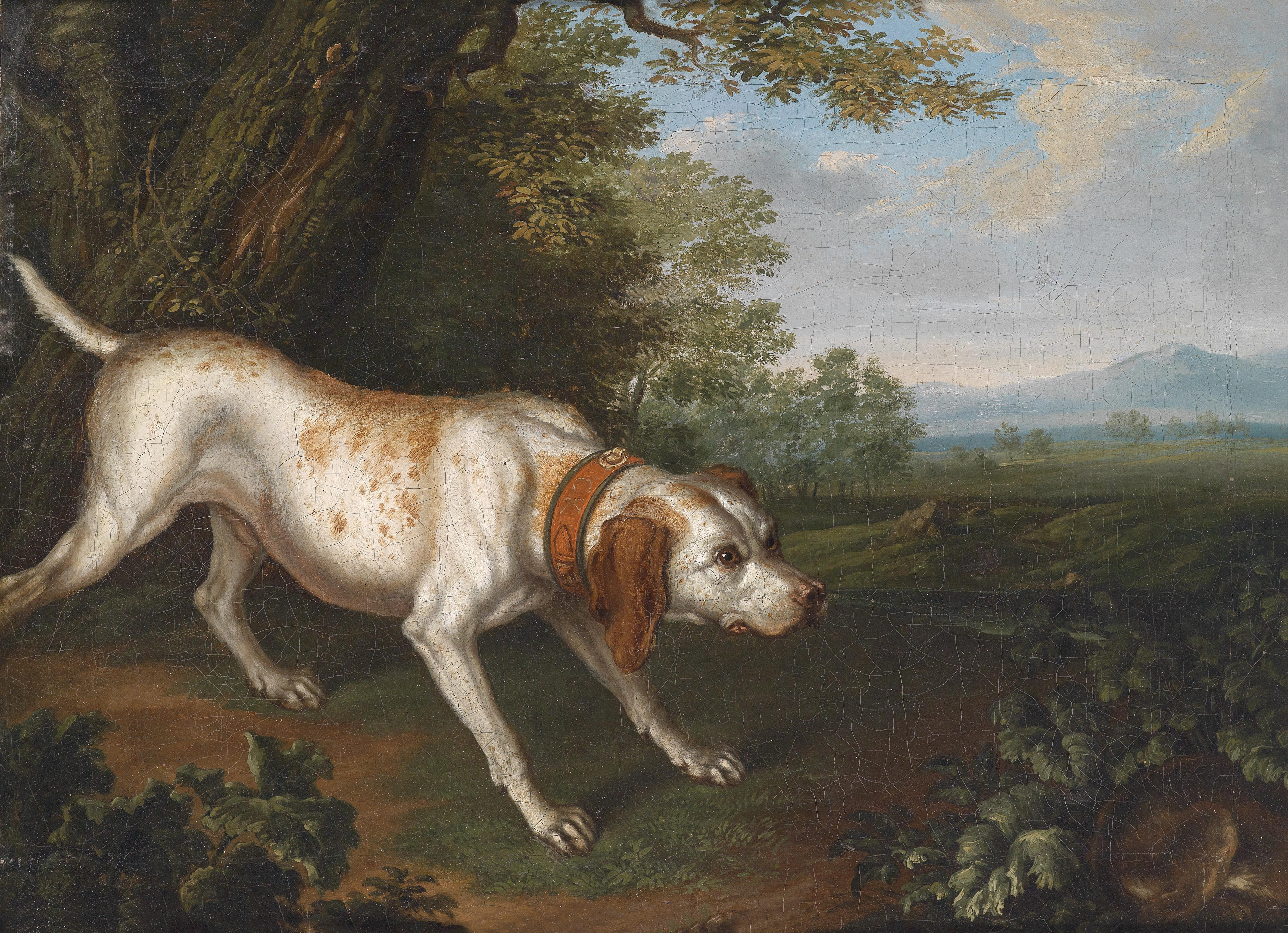 Ein die Beute witternder Jagdhund in einer Landschaft